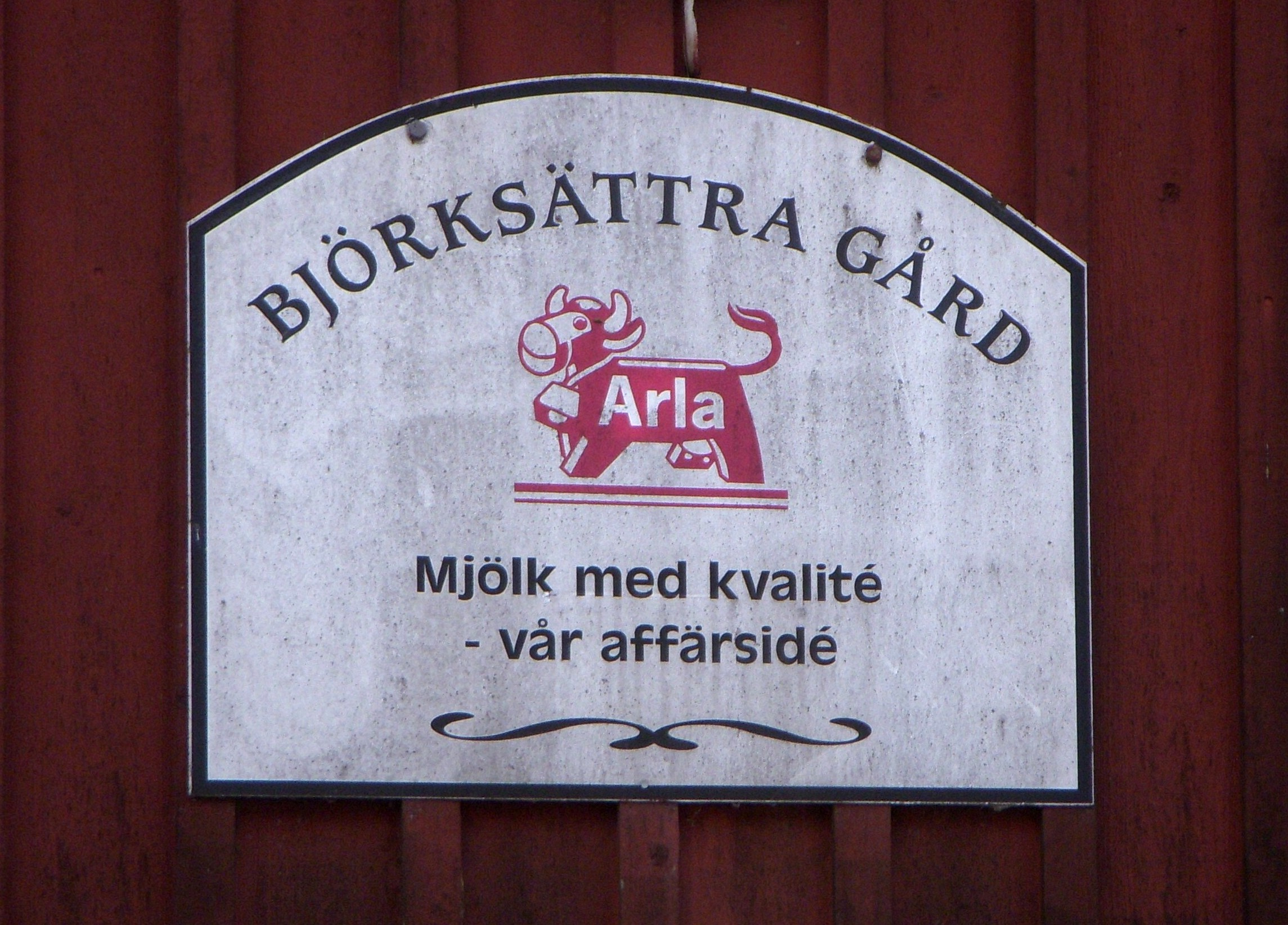 Björksättra gård, skylt Arla